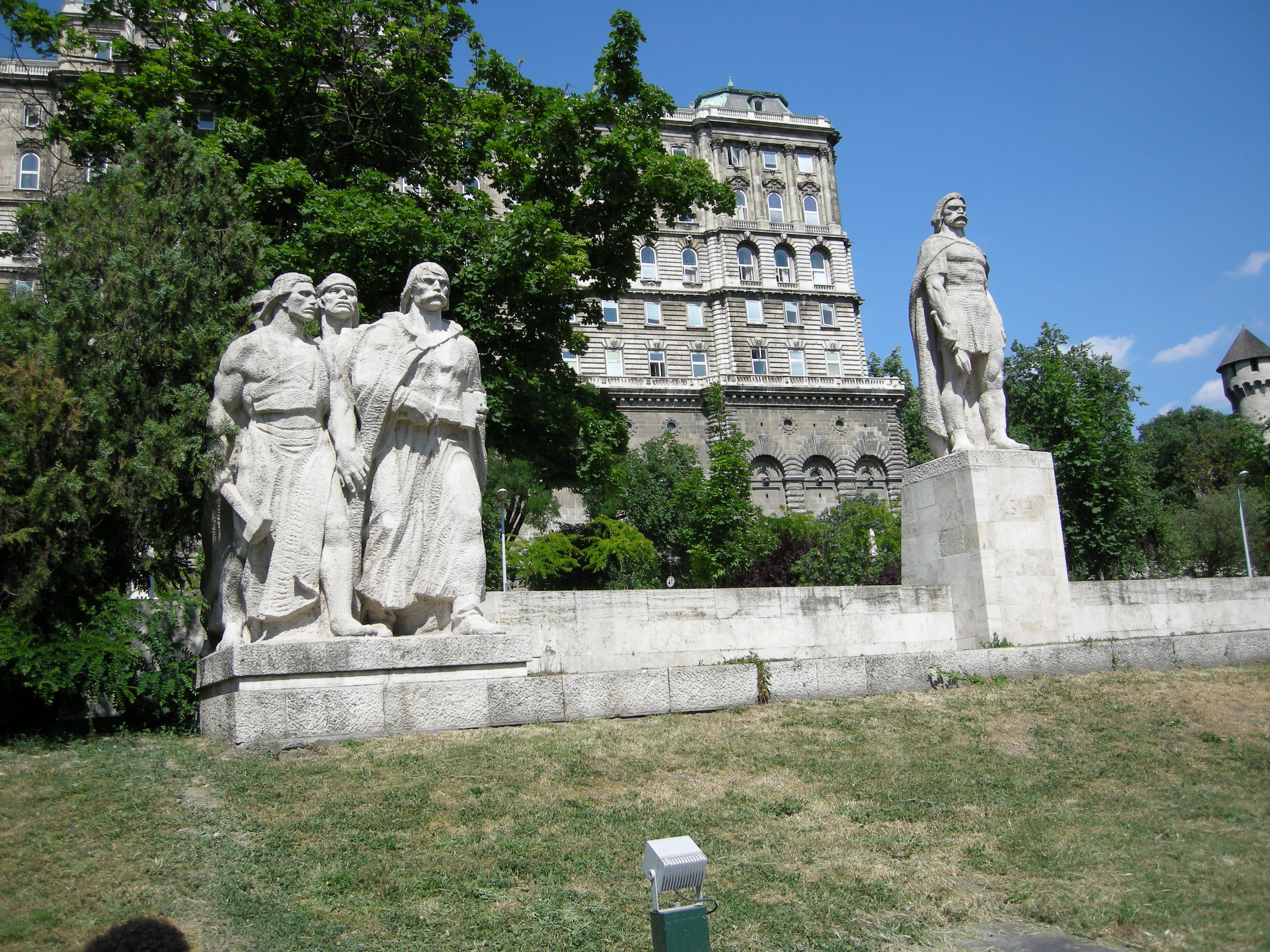 Budapest. Sculptor: István Kiss (1961)in Dózsa György tér